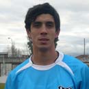 Arquero